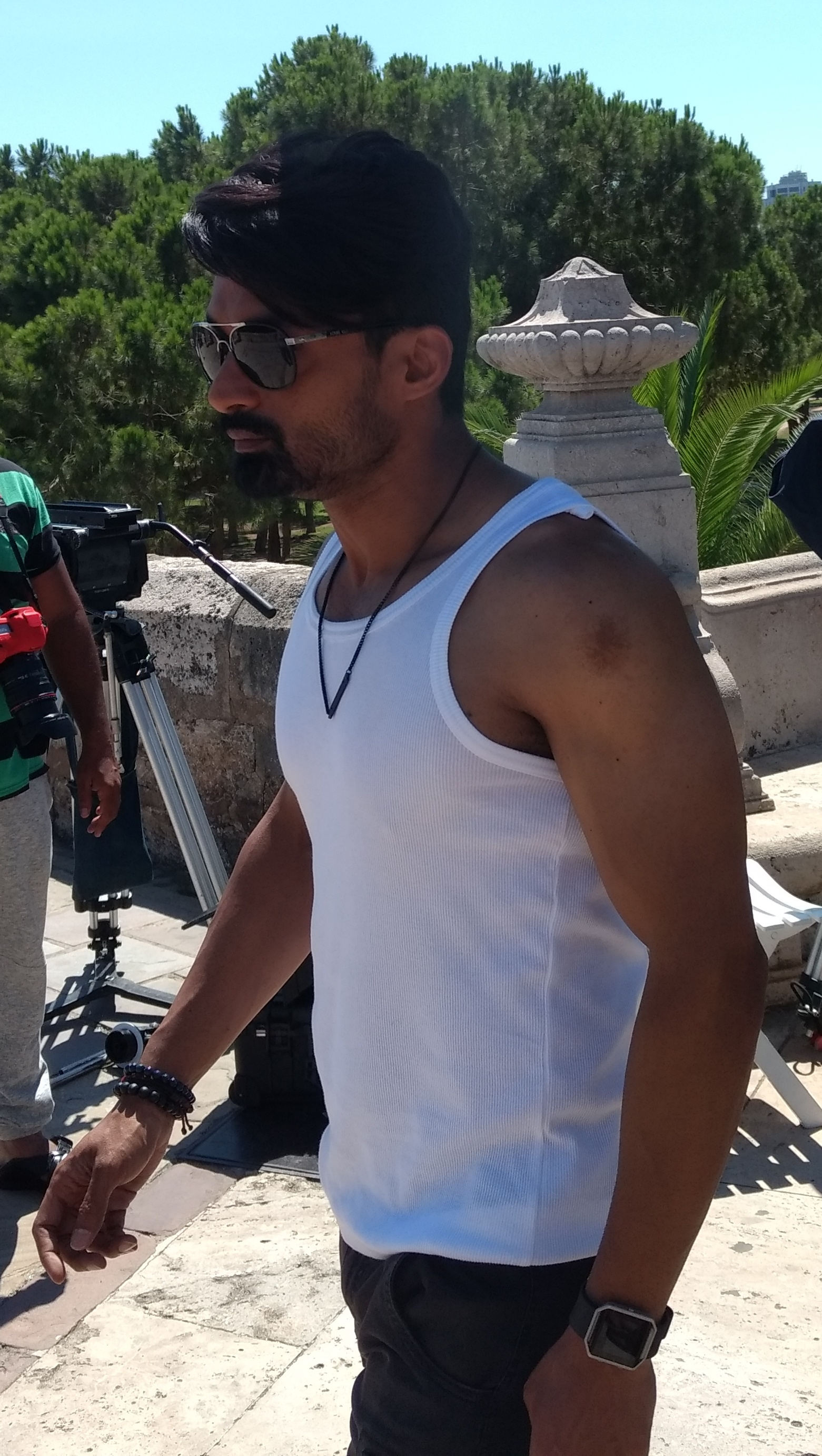 Rodatge de la pel·lícula amb nom clau "Producció número 8" a València, 2016.